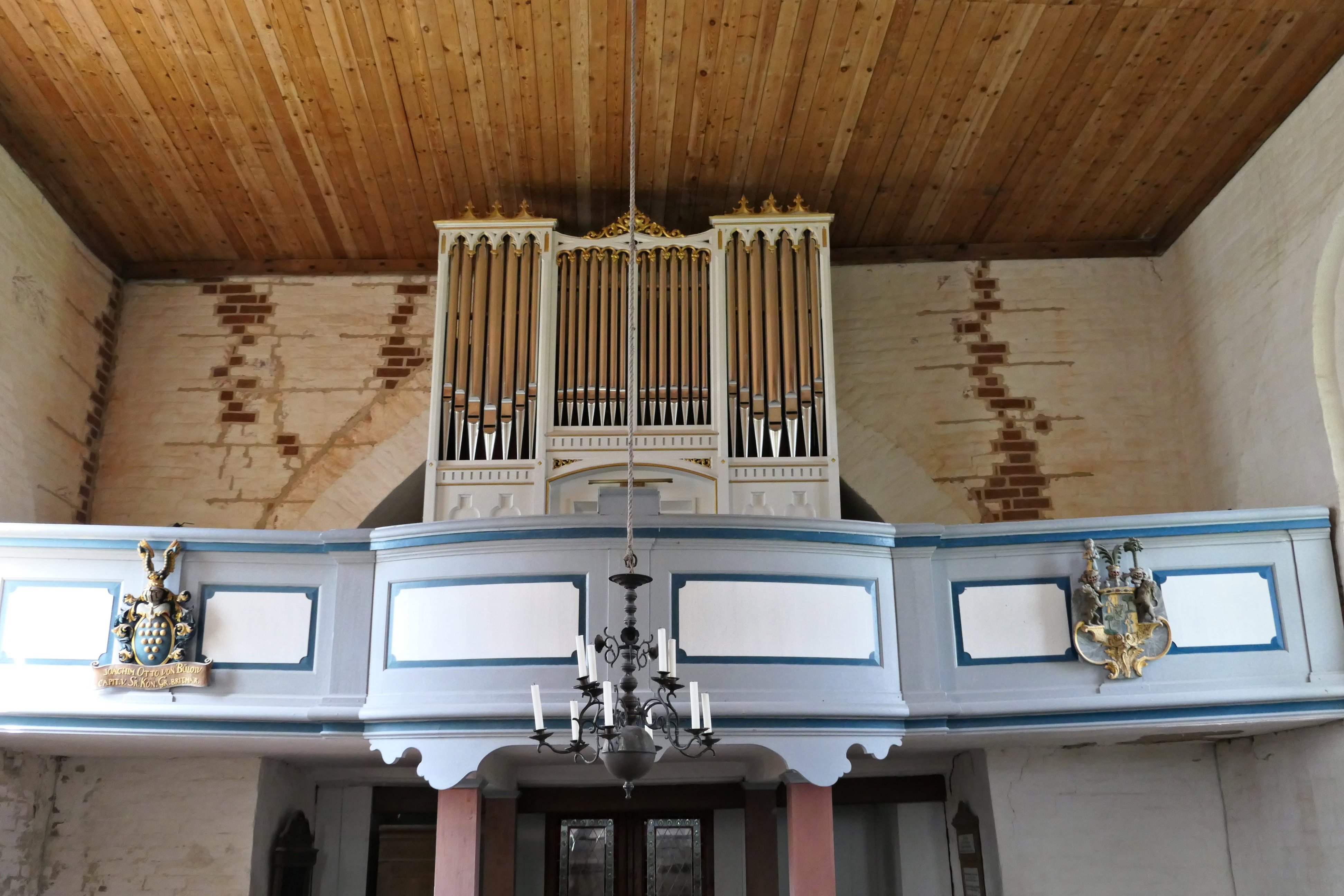 Orgel in Friedrichshagen, Gemeinde Upahl, Landkreis Nordwestmecklenburg, Mecklenburg-Vorpommern, Deutschland